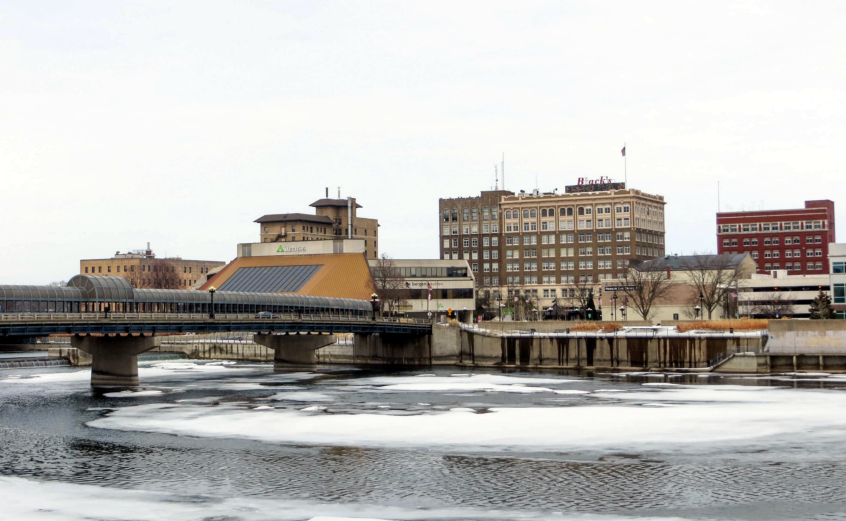 Waterloo, Iowa.